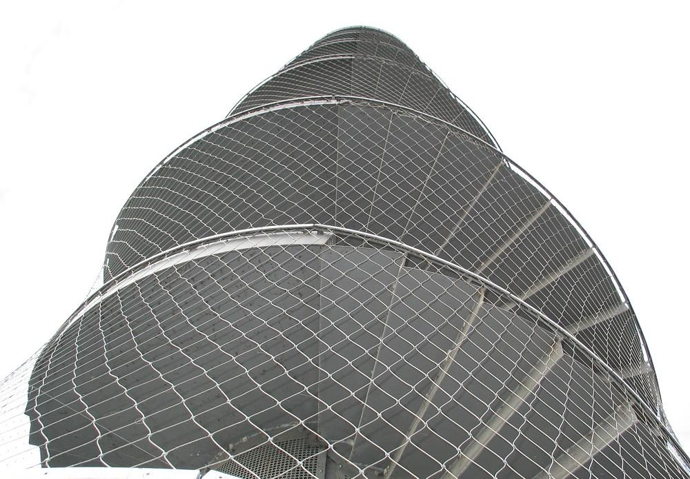 Der Pegelturm in Bitterfeld im gefluteten Tagebau "Goitzsche" (Bernsteinsee). Sonstiges: ...